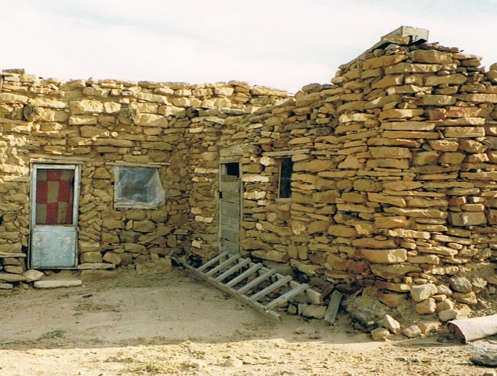 Kyotsmovi, Hopi Reservat Third Mesa in Navajo County, Arizona